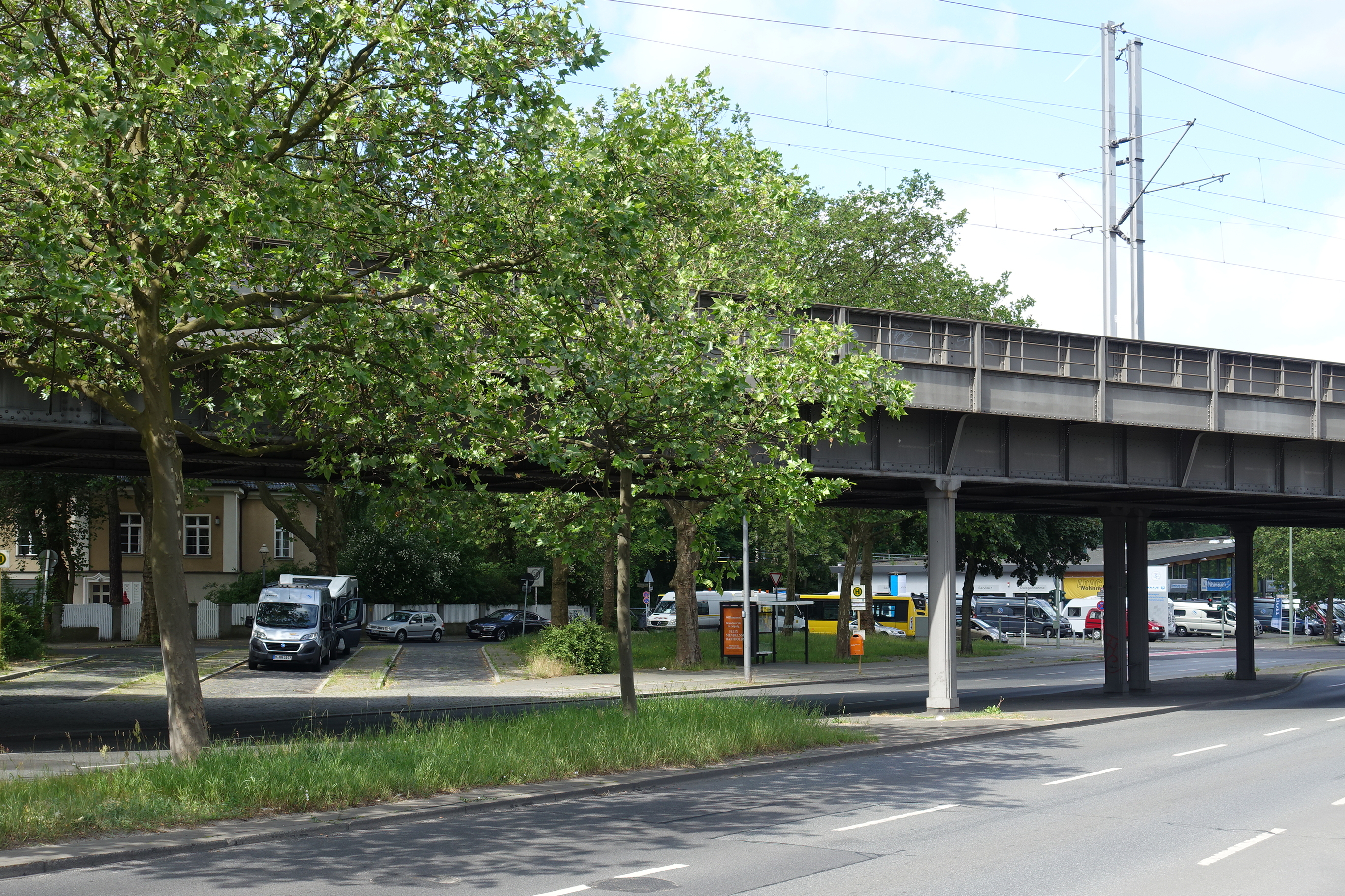 Auf der Bahnstrecke, die die Charlottenburger Chaussee überquert, verkehren Regionalbahnen.